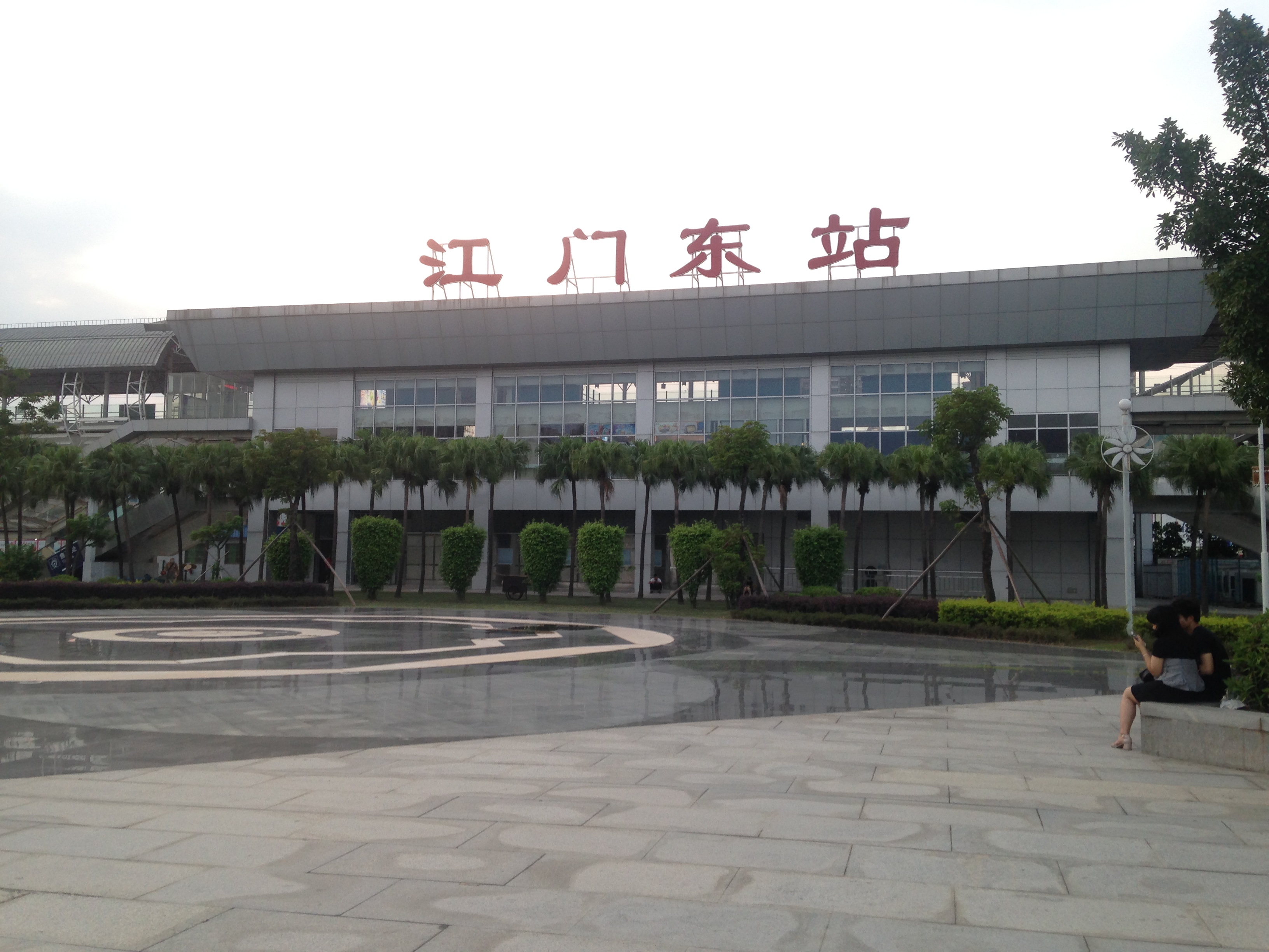 城规江门东站正面